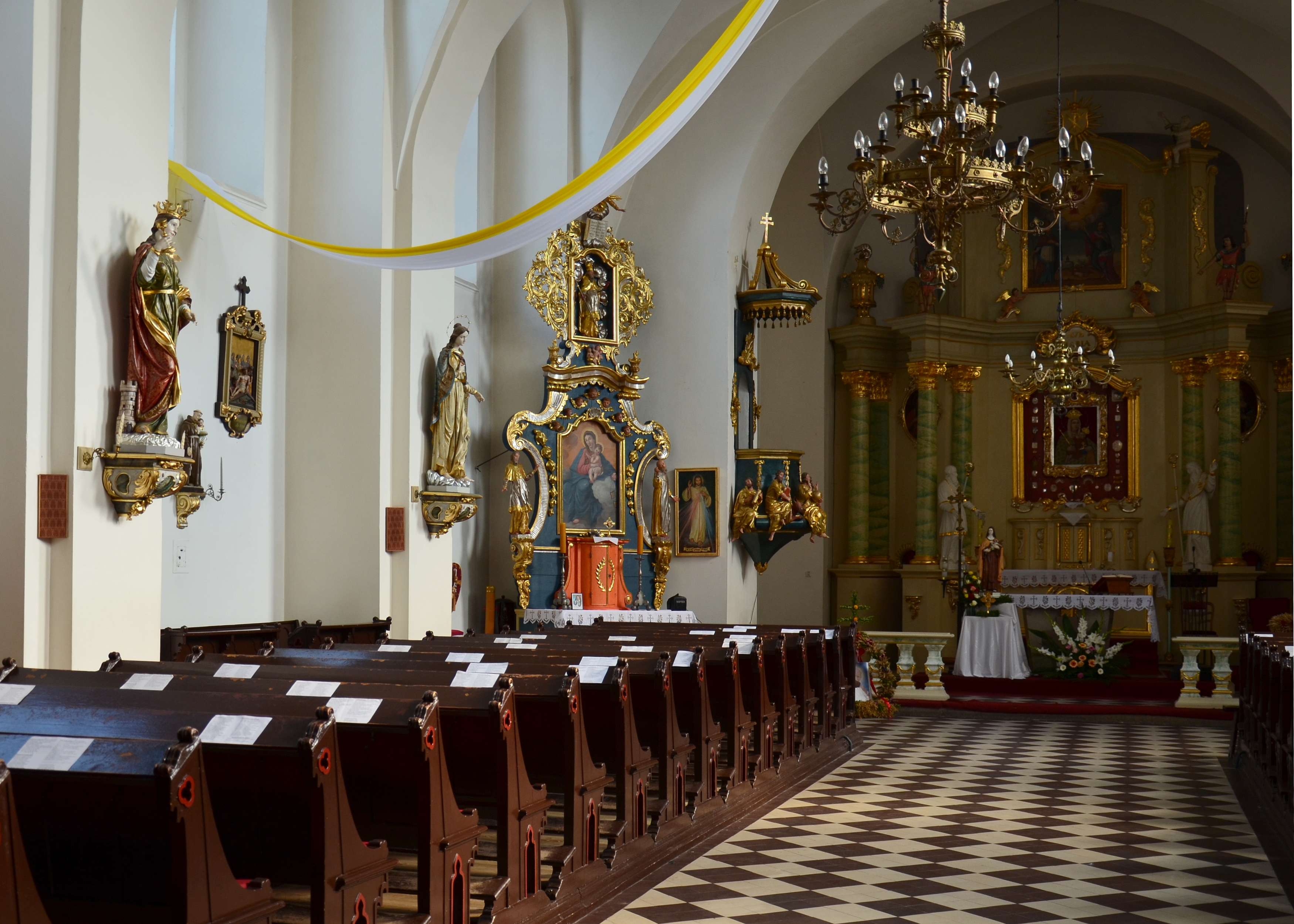 Górzno, kościół par. pw. Św. Krzyża, 1765-1773